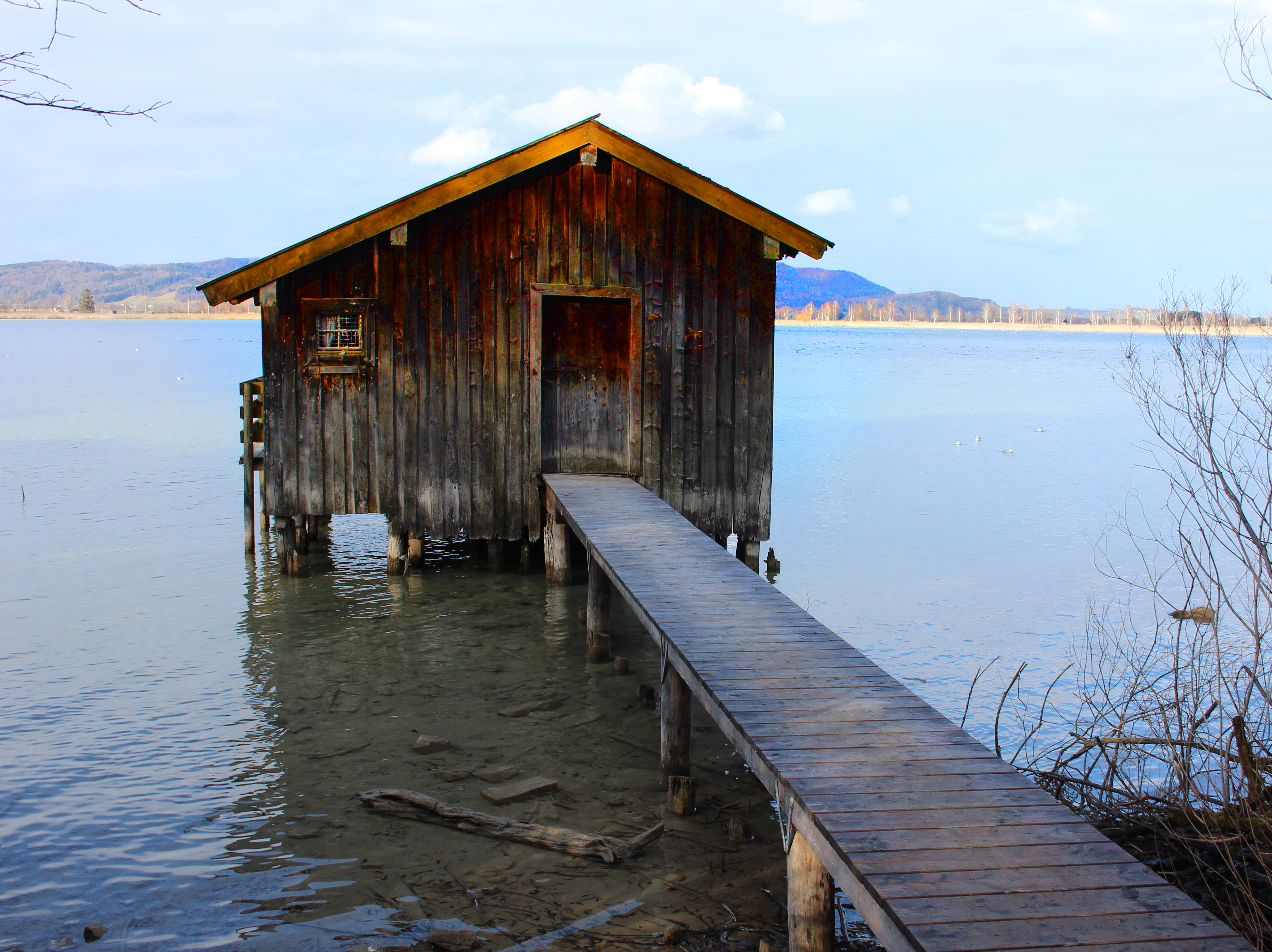 Bootshaus am Kochelsee bei Kochel am See